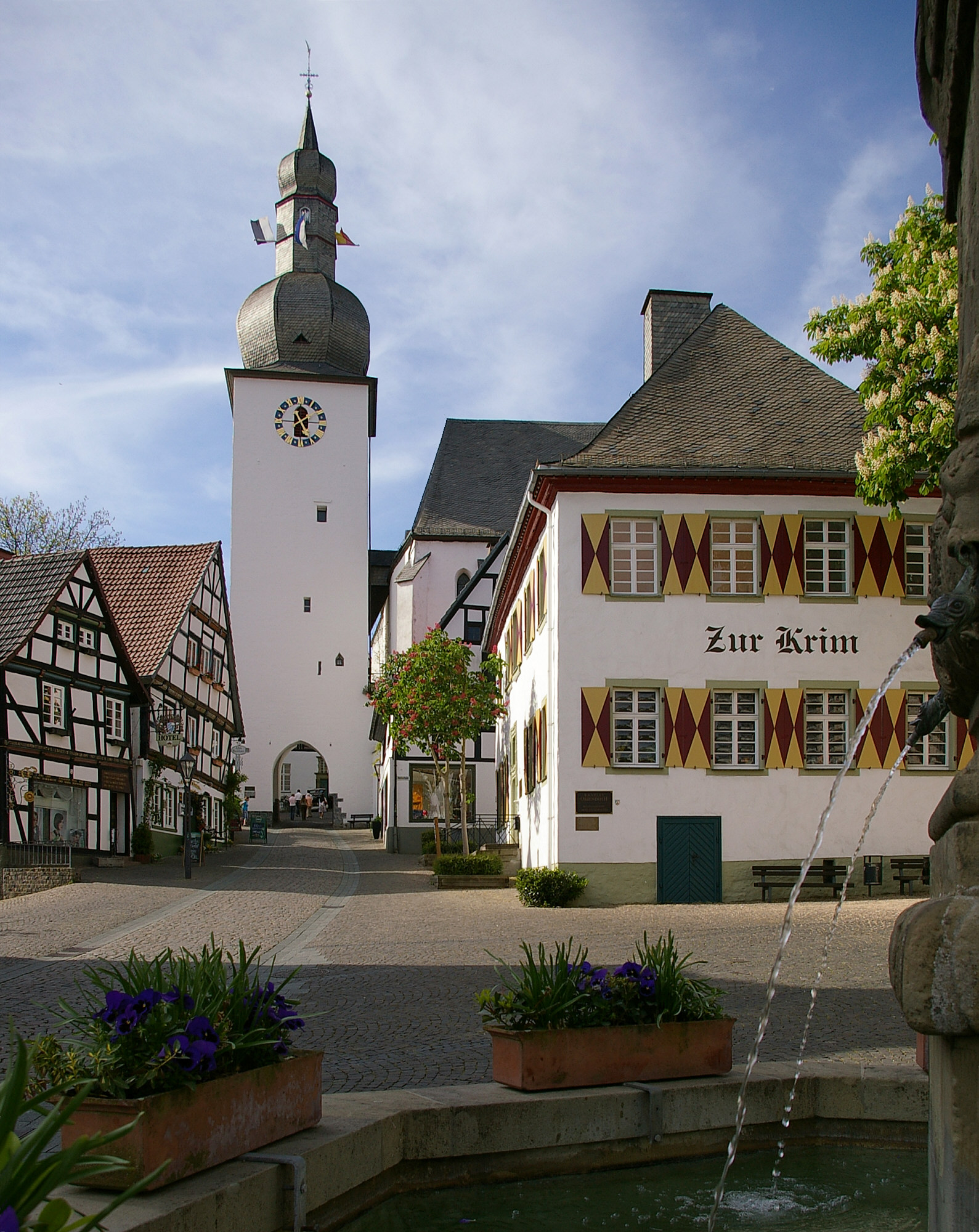 Glockenturm und "Zur Krim", Alter Markt, Arnsberg, Nordrhein-Westfalen